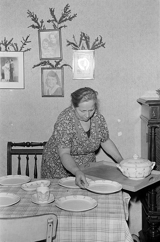 Original image description from the Deutsche Fotothek Porträt einer alten Frau